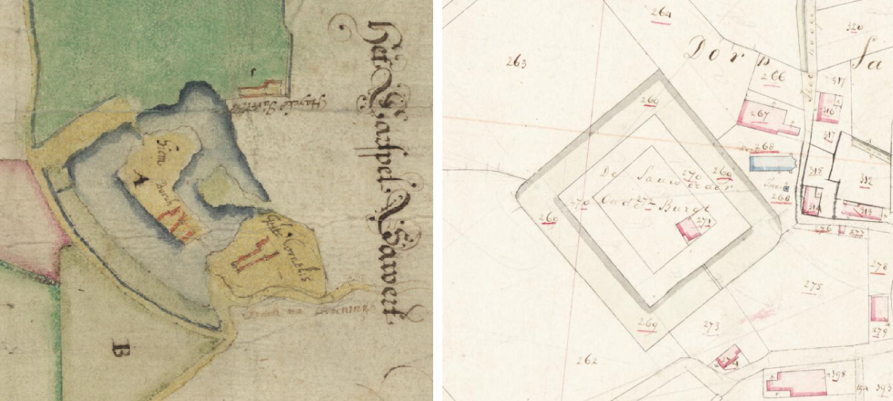 De locatie van de vroegere Onstaborg in Sauwerd op de kaart van Haubois uit 1641 en de kadastrale minuut uit 1828.